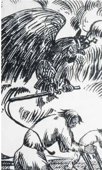 Міхась Філіповіч. Ілюстрацыя да паэмы "Босыя на вогнішчы" М. Чарота